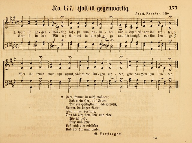 Gott ist gegenwärtig, Melodie und Satz 1878